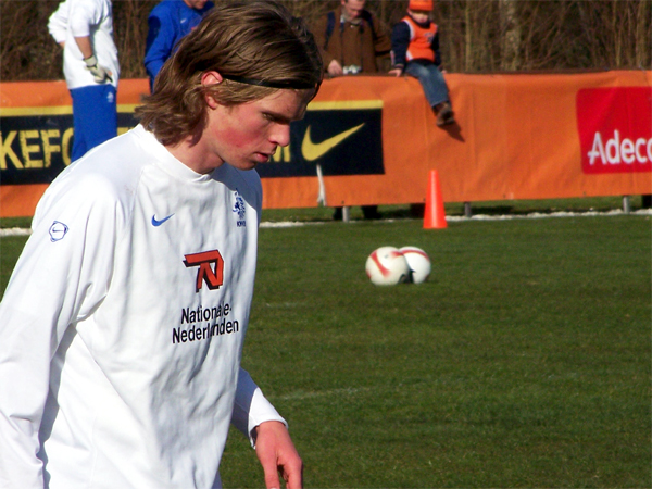 Kees Luyckx